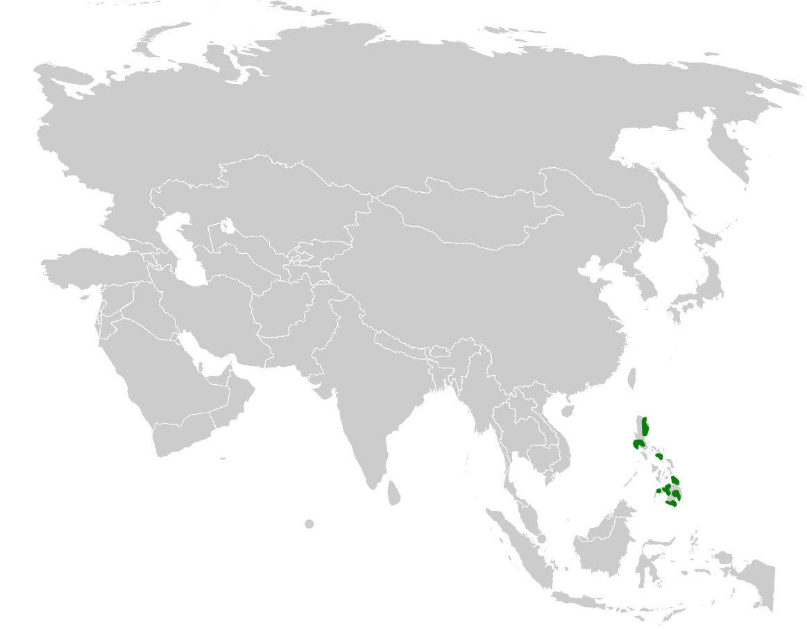 Parus semilarvatus distribution map